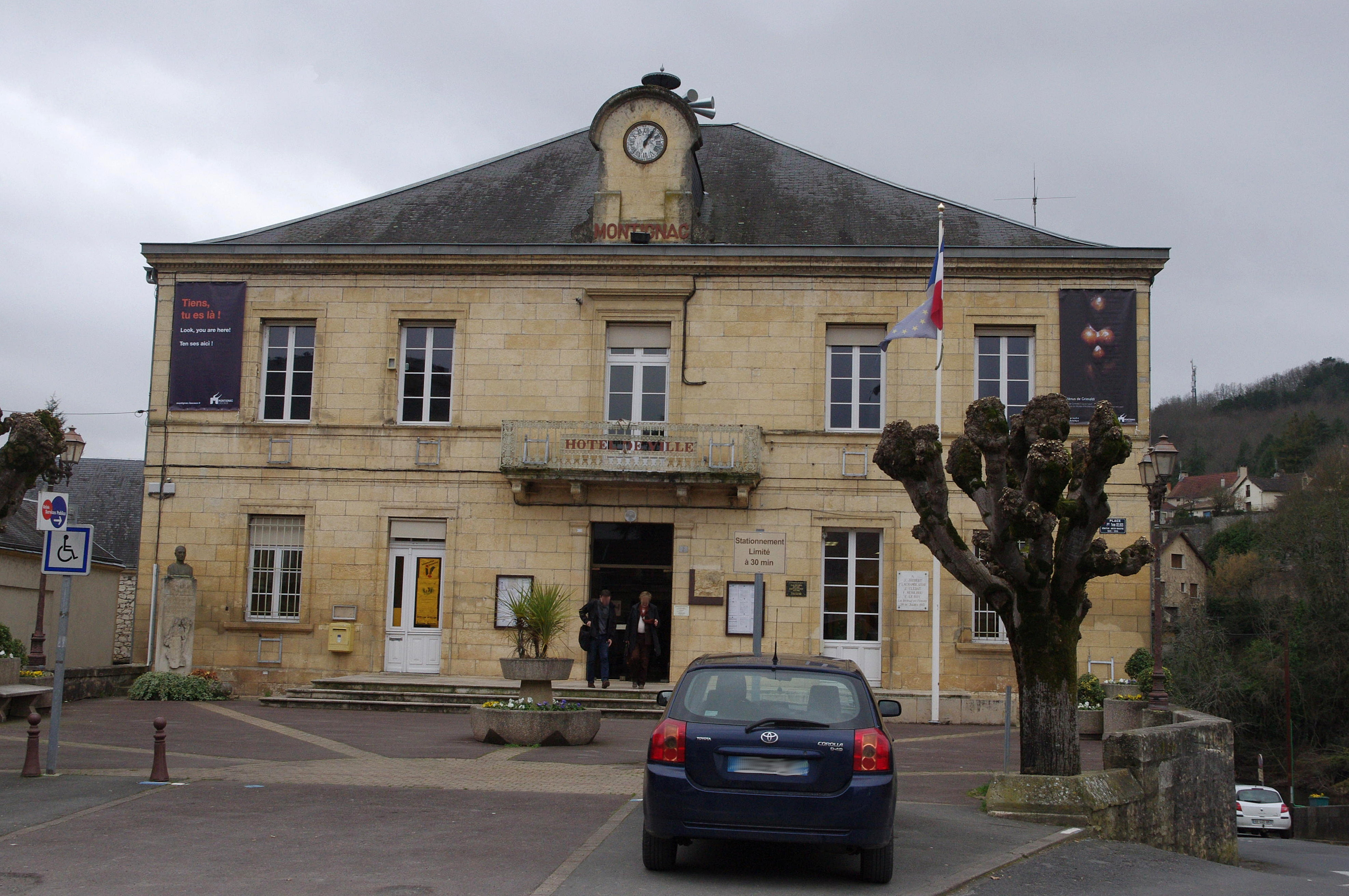 Montignac, Dordogne, France. L'hôtel de ville.